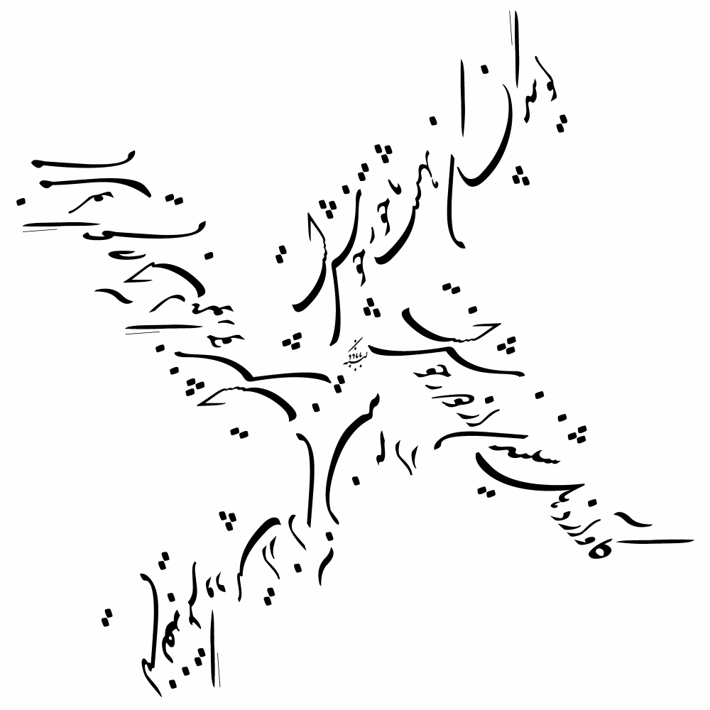 Beschreibung: Vierzeiler Omar Chayyams. Der Text ist gegen den Uhrzeigersinn von rechts oben beginnend zu lesen. Der Duktus ist persisches Schekaste.